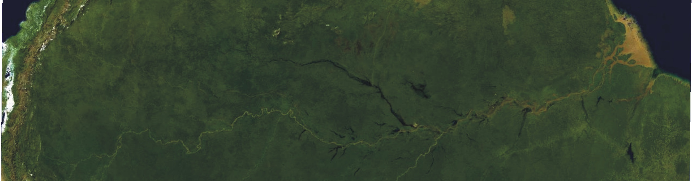 eigene Darstellung unter Zuhilfenahme von NASA WorldWind 1.2d